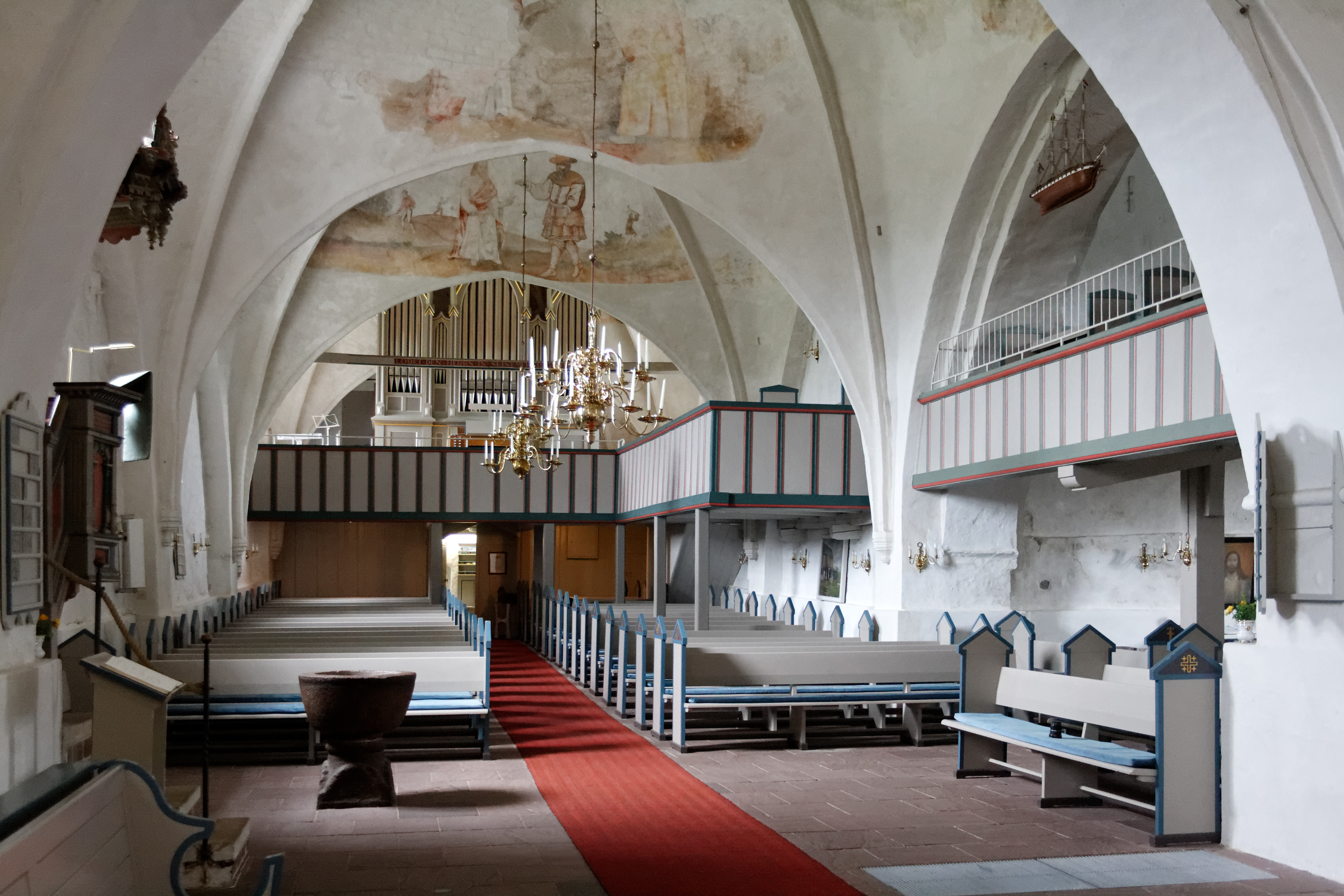 Kirche St. Laurentii in Süderende, Insel Föhr: Blick vom Altar zur Orgel.